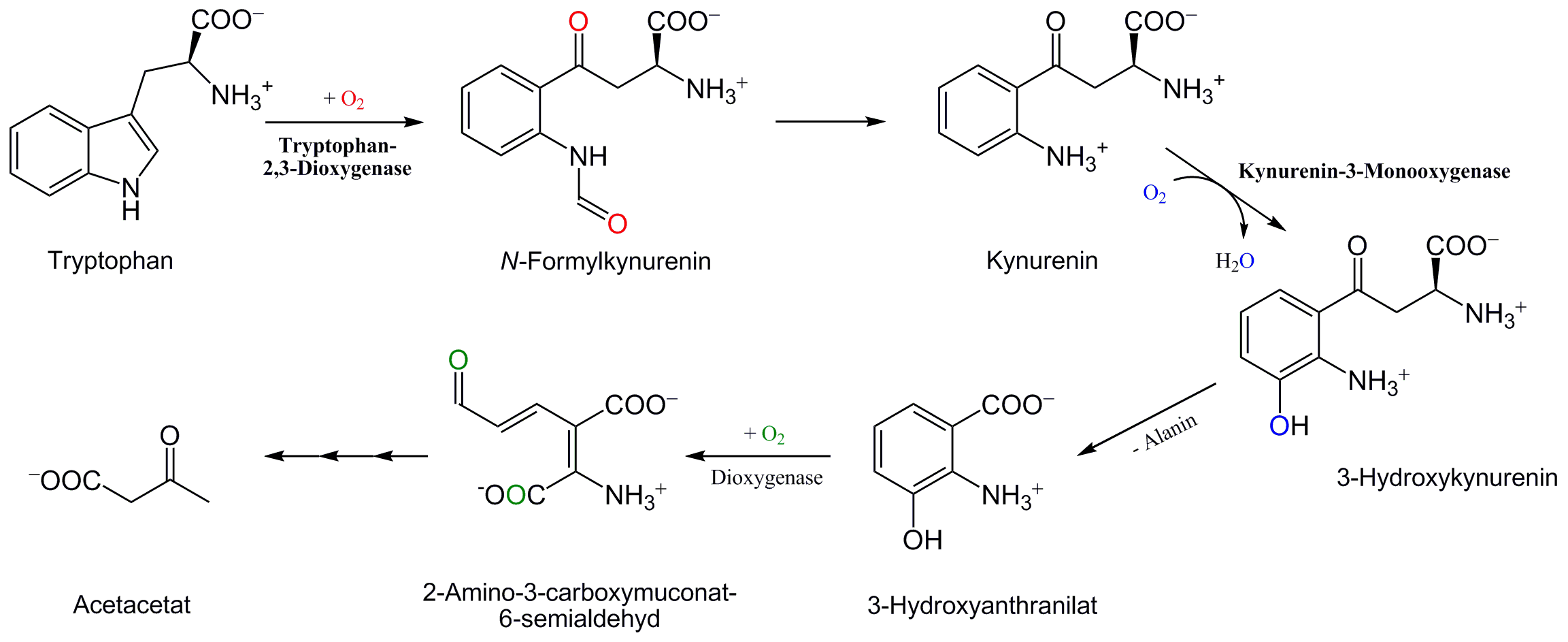 Abbau Tryptophans mittels Di- bzw. Monooxygenasen